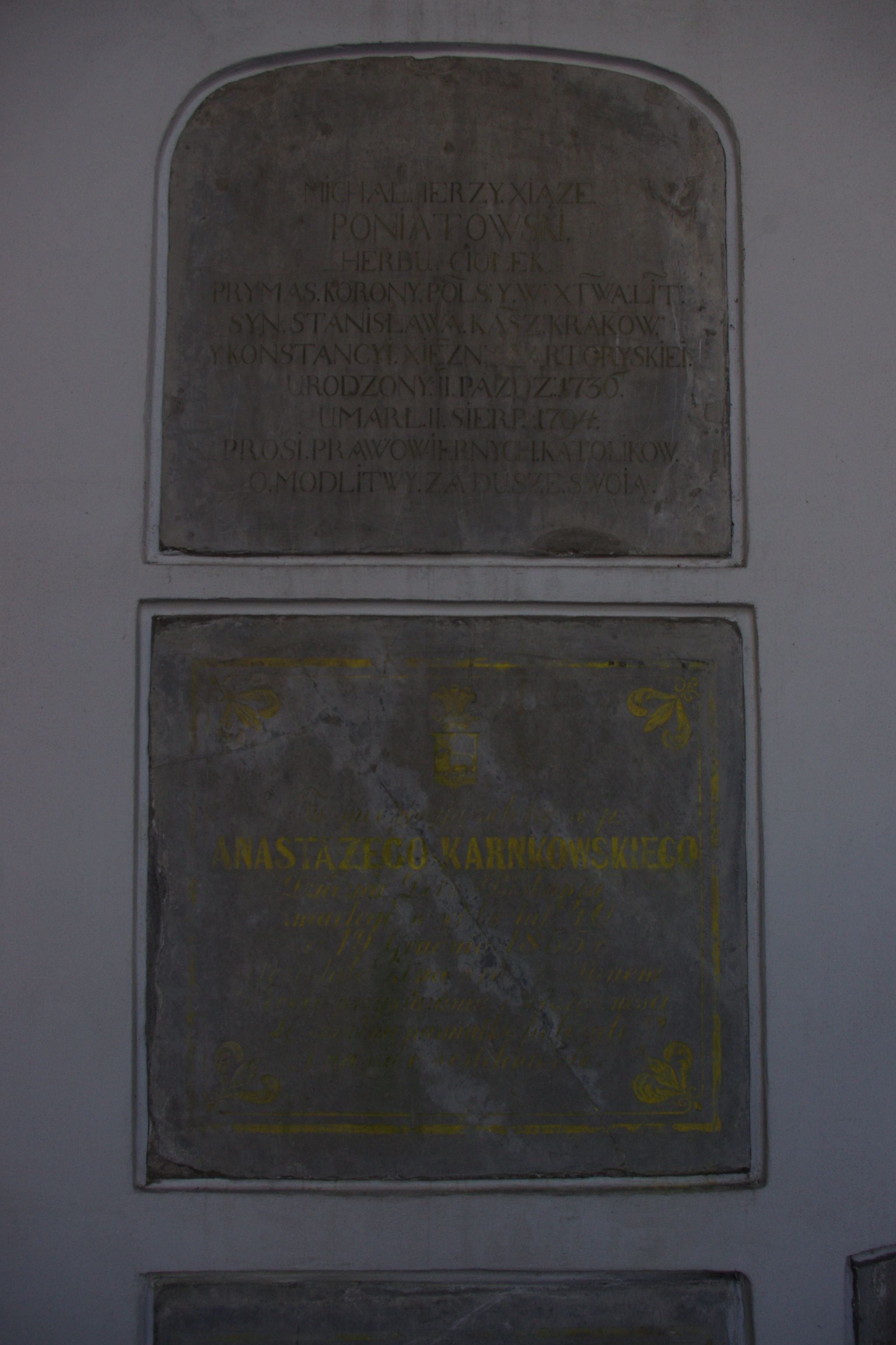 Grób prymasa Michała Jerzego Poniatowskiego (1736-1794) u góry i ziemianina Anastazego Karnkowskiego (1814-1855) - dziedzica dóbr Biskupie w powiecie konirtskim, właściciela wsi Karnkowo, w Katakumbach warszawskiego Cmentarza Powązkowskiego